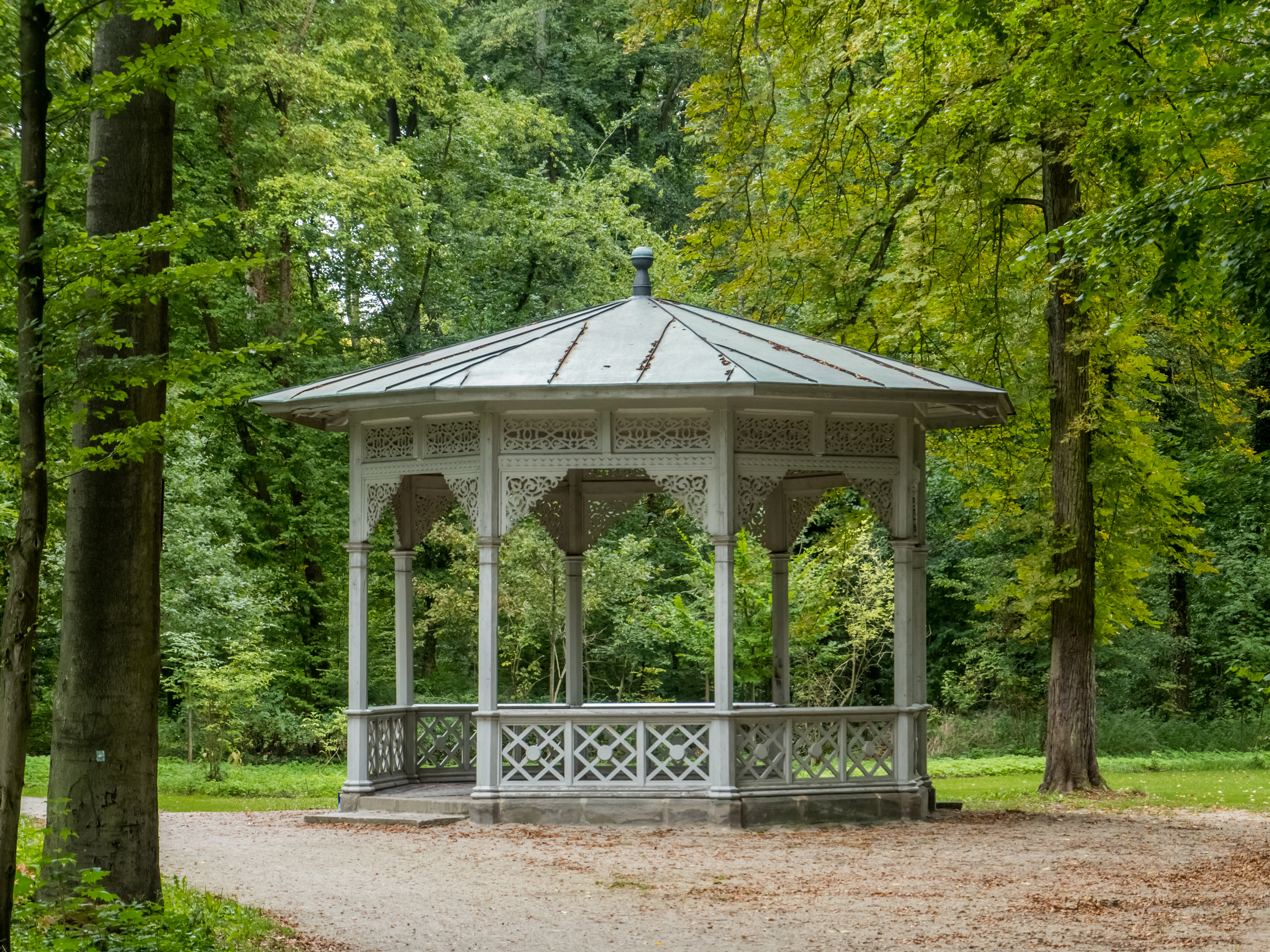 Pavillion im Hain in Bamberg